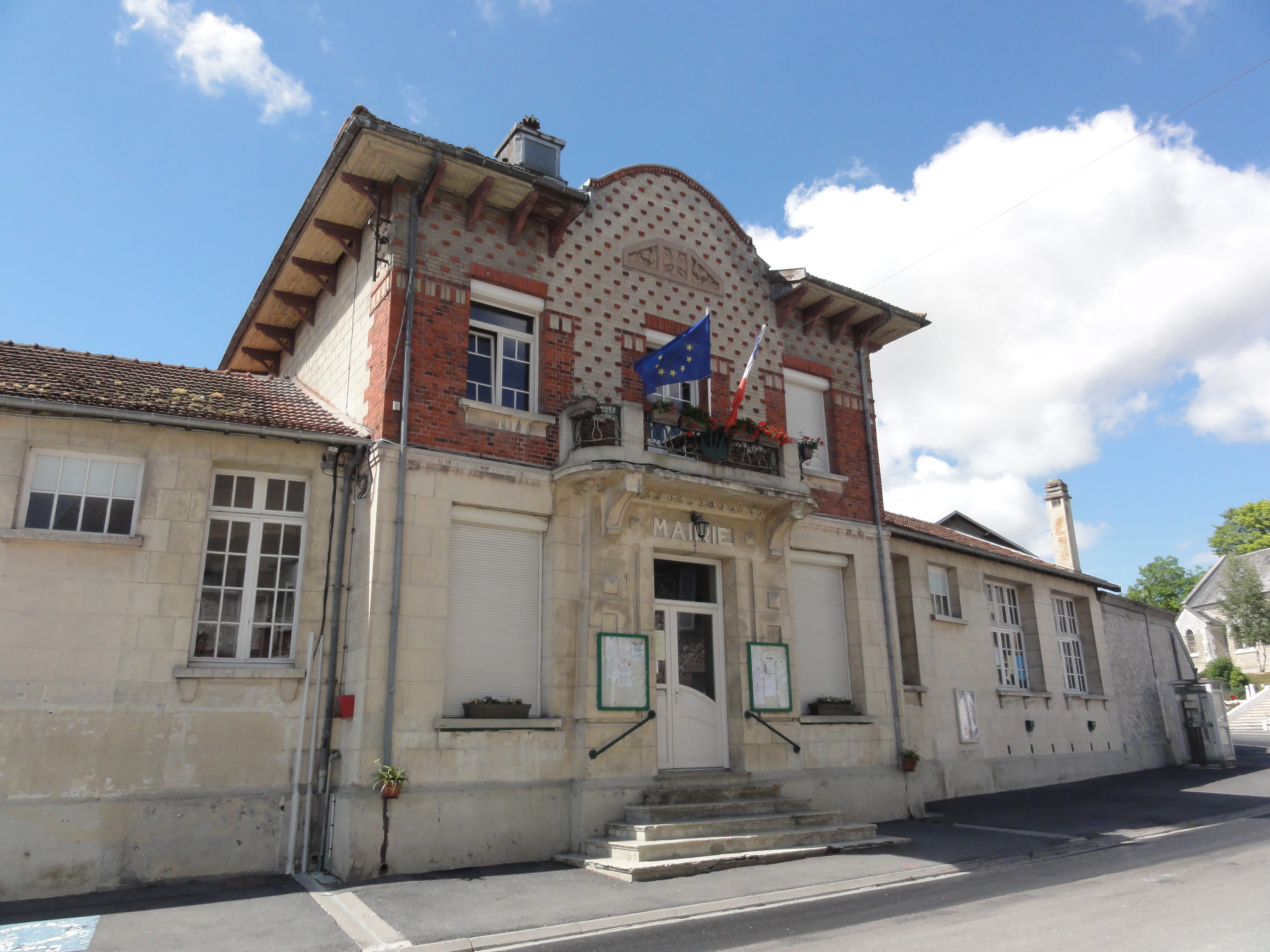 Évergnicourt (Aisne) mairie